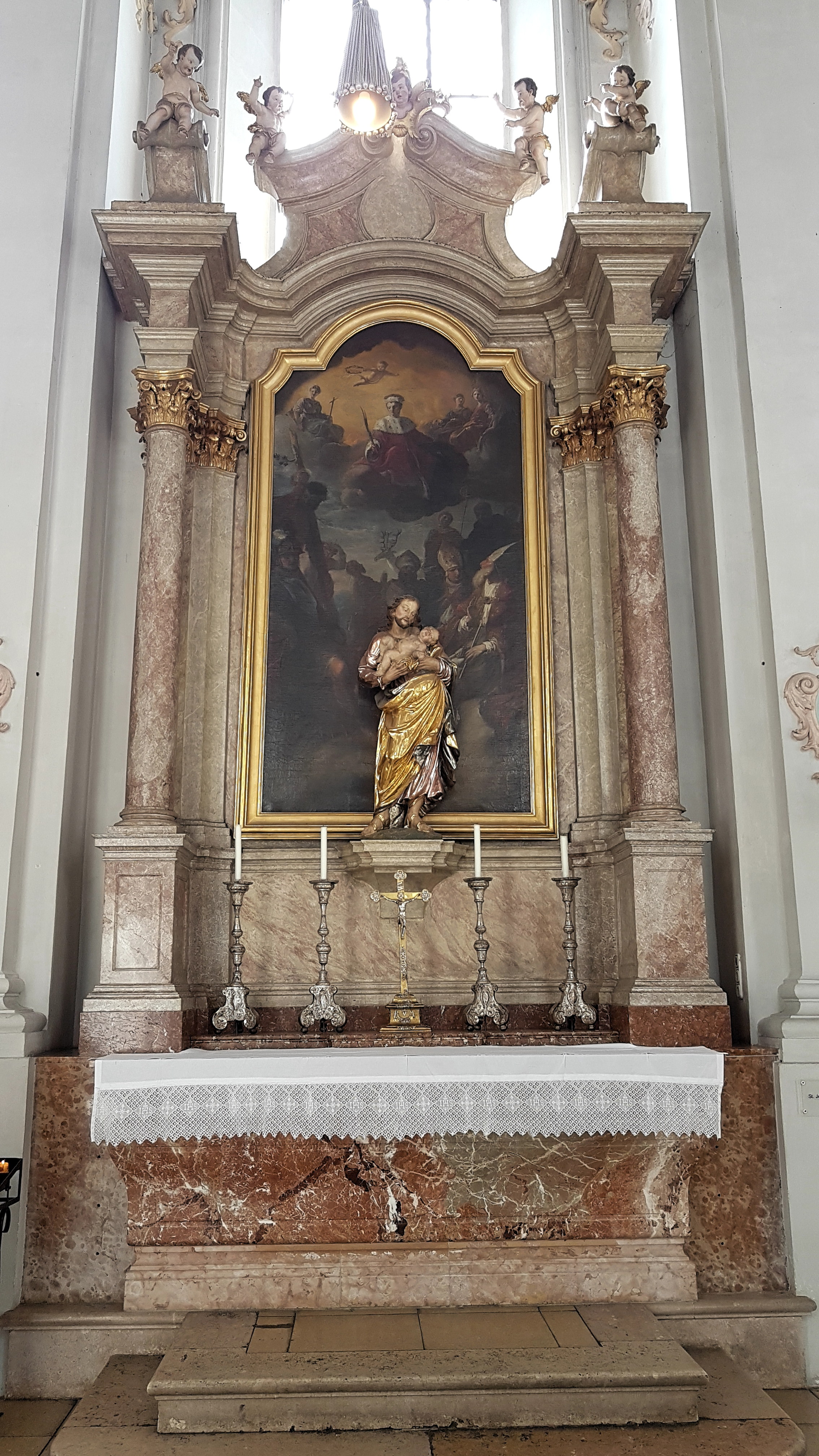 München, Hl. Geist, Josefsaltar